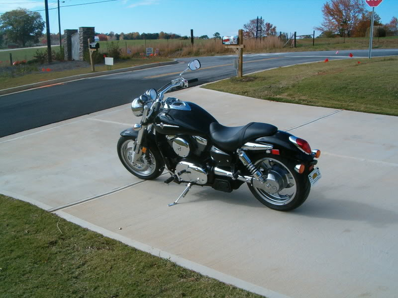 Кавасаки Минстрик 2006